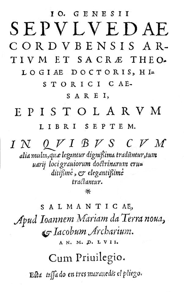 Portada del Epistolarum libri septem. Publicado en Salamanca en 1557 por Juan Ginés de Sepúlveda.